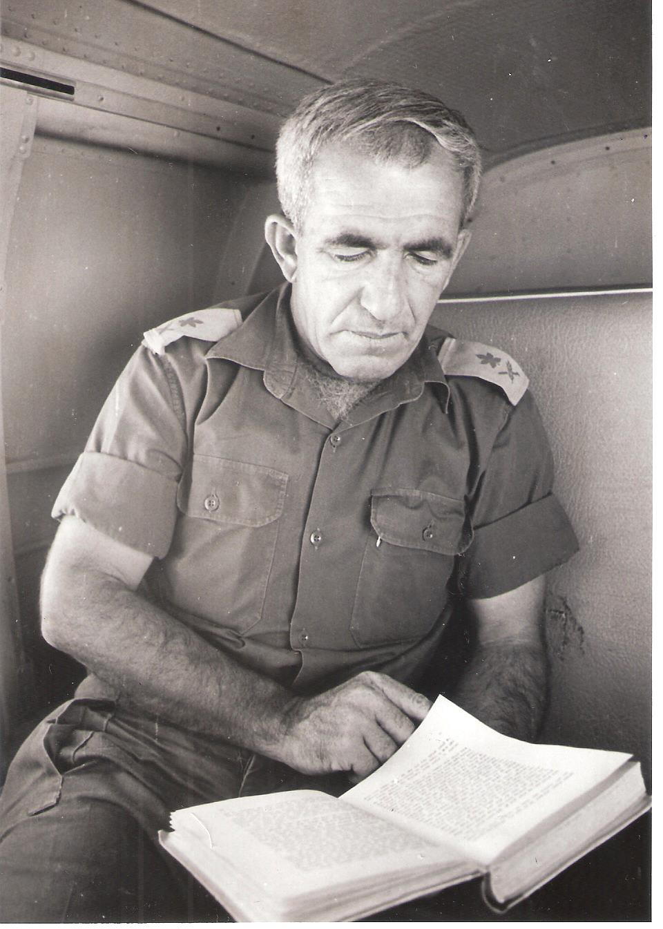 האלוף אברהם בוצר בשירות מילואים